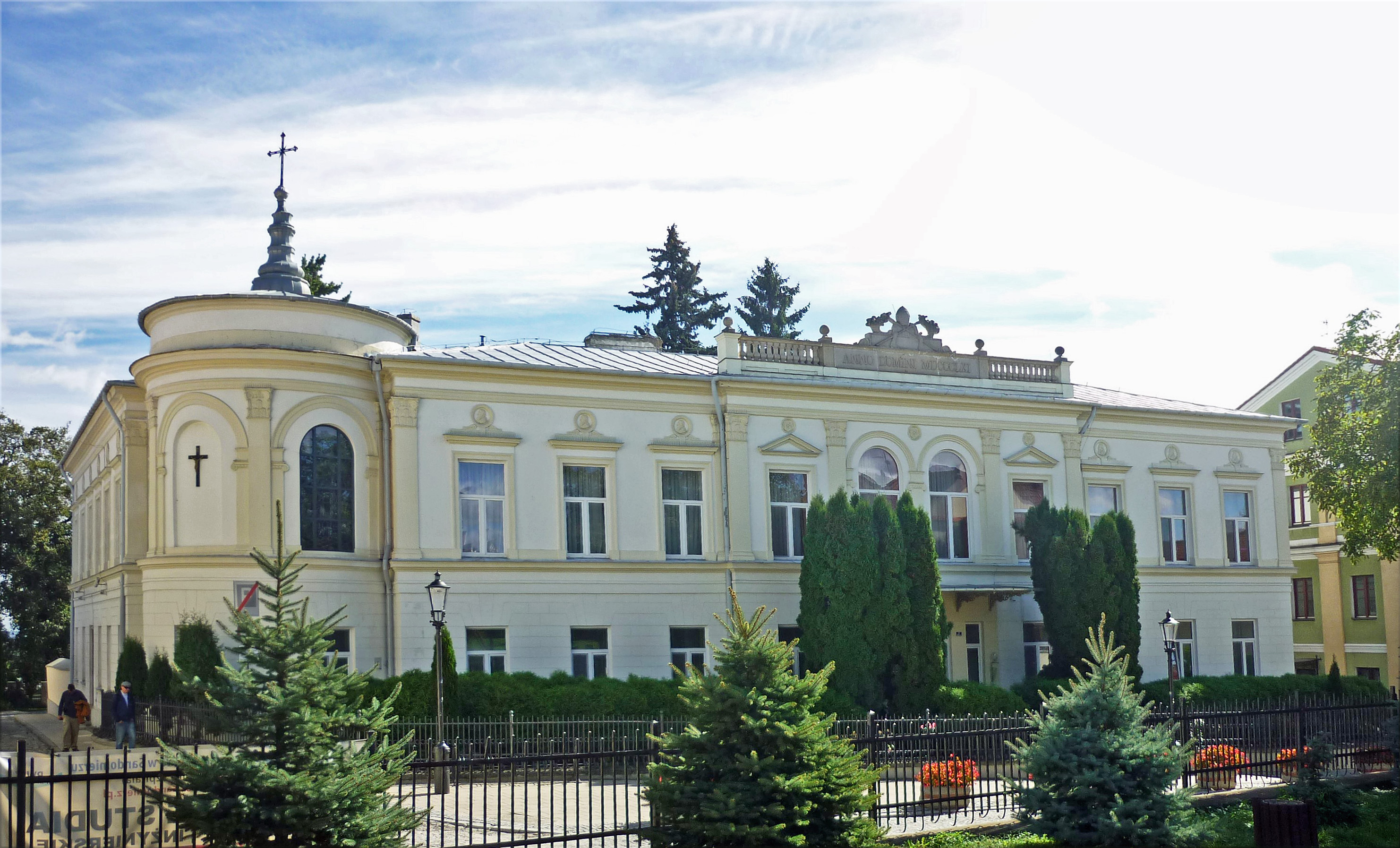 Bischofspalast in Sandomierz